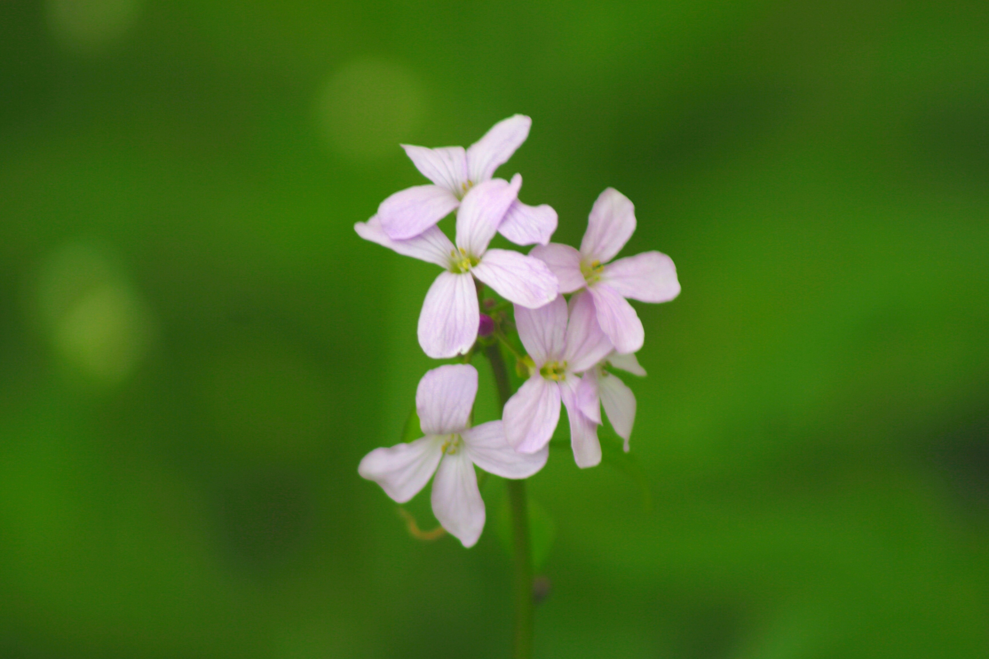 Cardamine_bulbifera (Dentaria Minore) Località : Melere, Trichiana (BL), 843 m s.l.m.